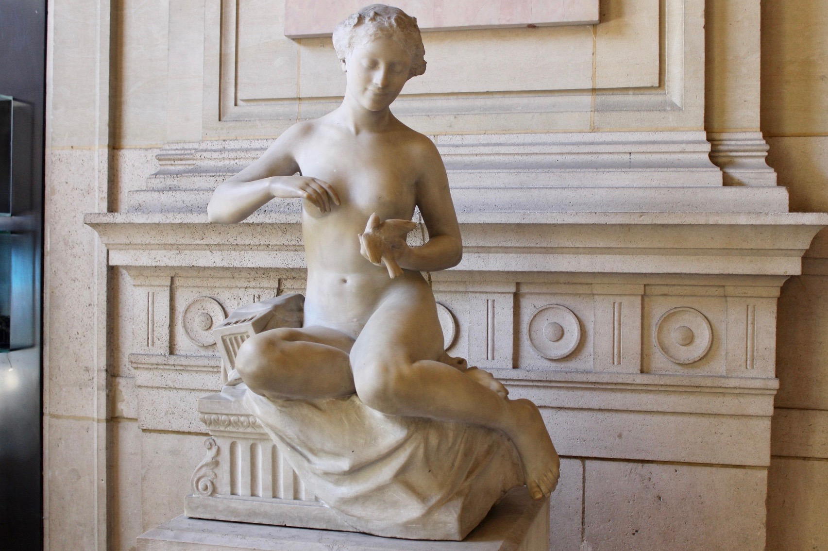 Statue en marbre blanc de 1911, réalisée par Laure Coutan, et exposée dans le hall de la mairie du 16e arrondissement à Paris (France).